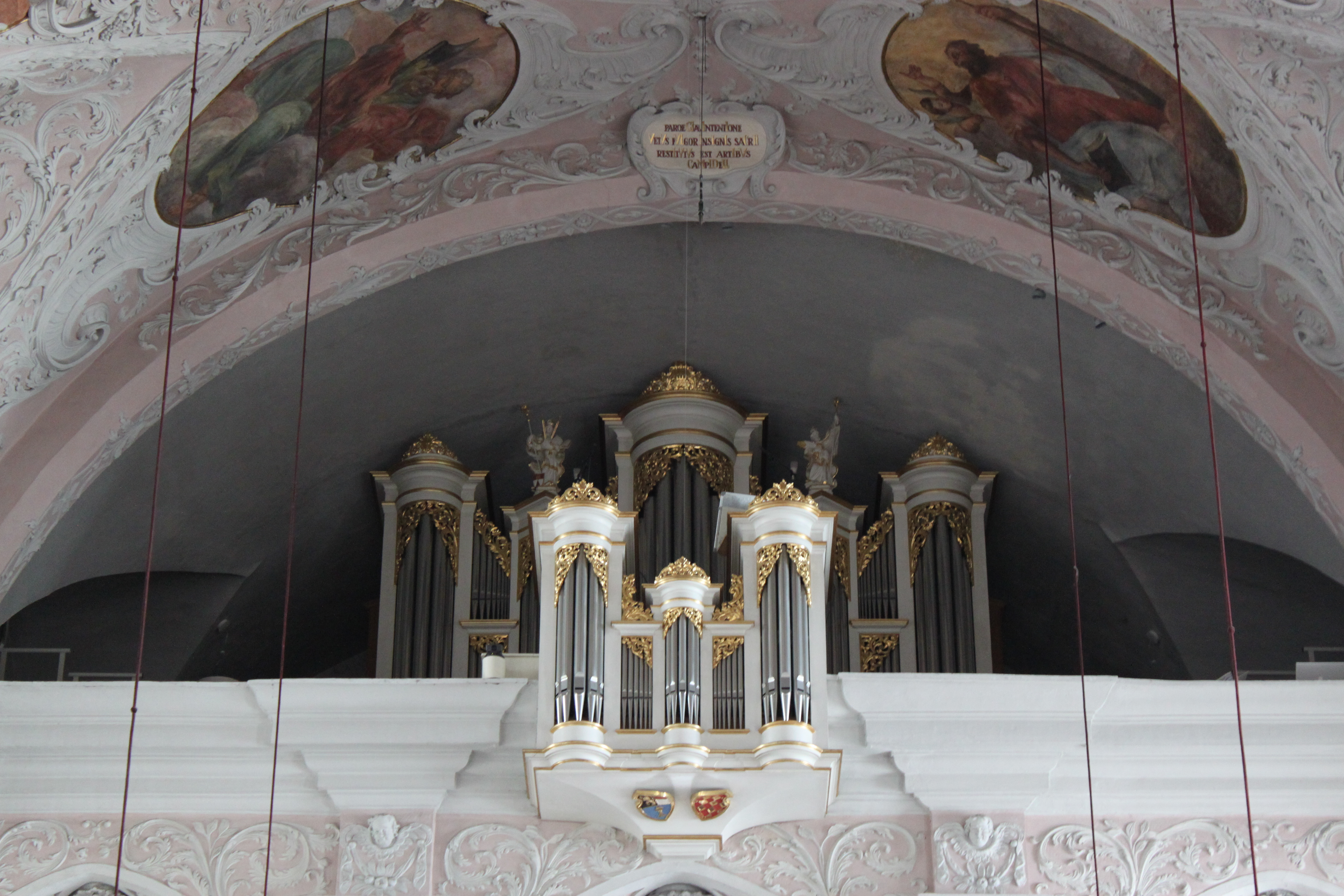 Orgel des Klagenfurter Doms, errichtet 1986 durch Mathis Orgelbau